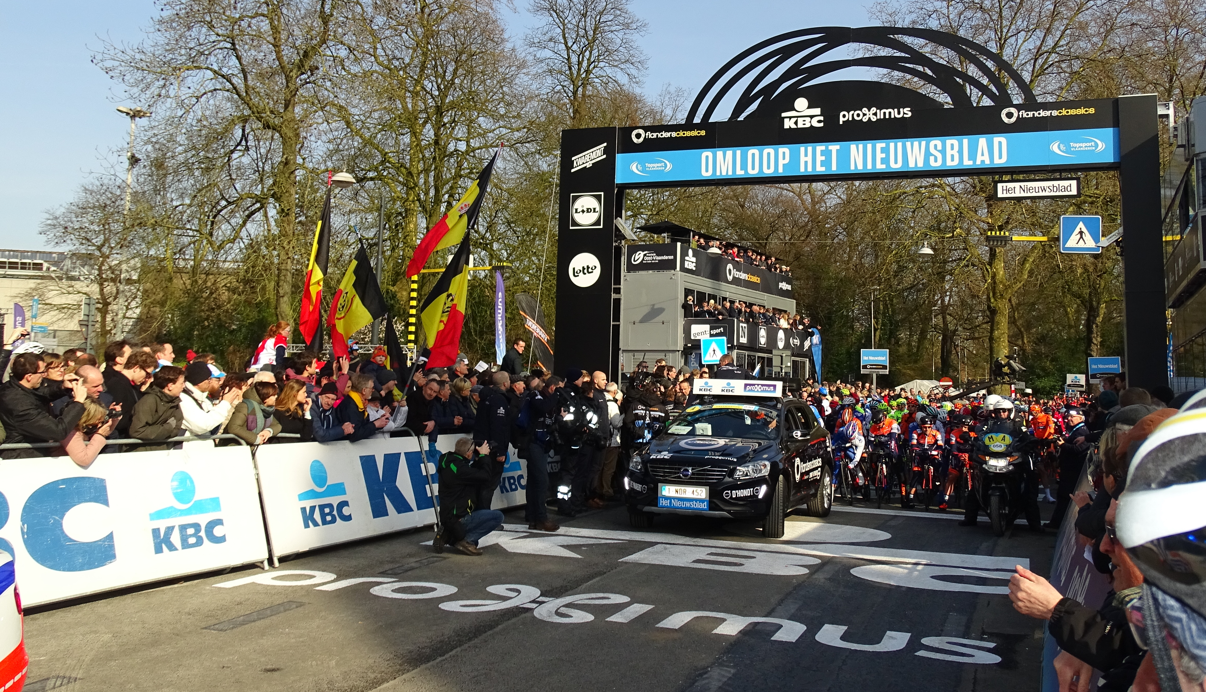 Reportage réalisé le samedi 27 février à l'occasion du départ et de l'arrivée du Circuit Het Nieuwsblad 2016 et de l'arrivée du Circuit Het Nieuwsblad féminin 2016 à Gand, Belgique.